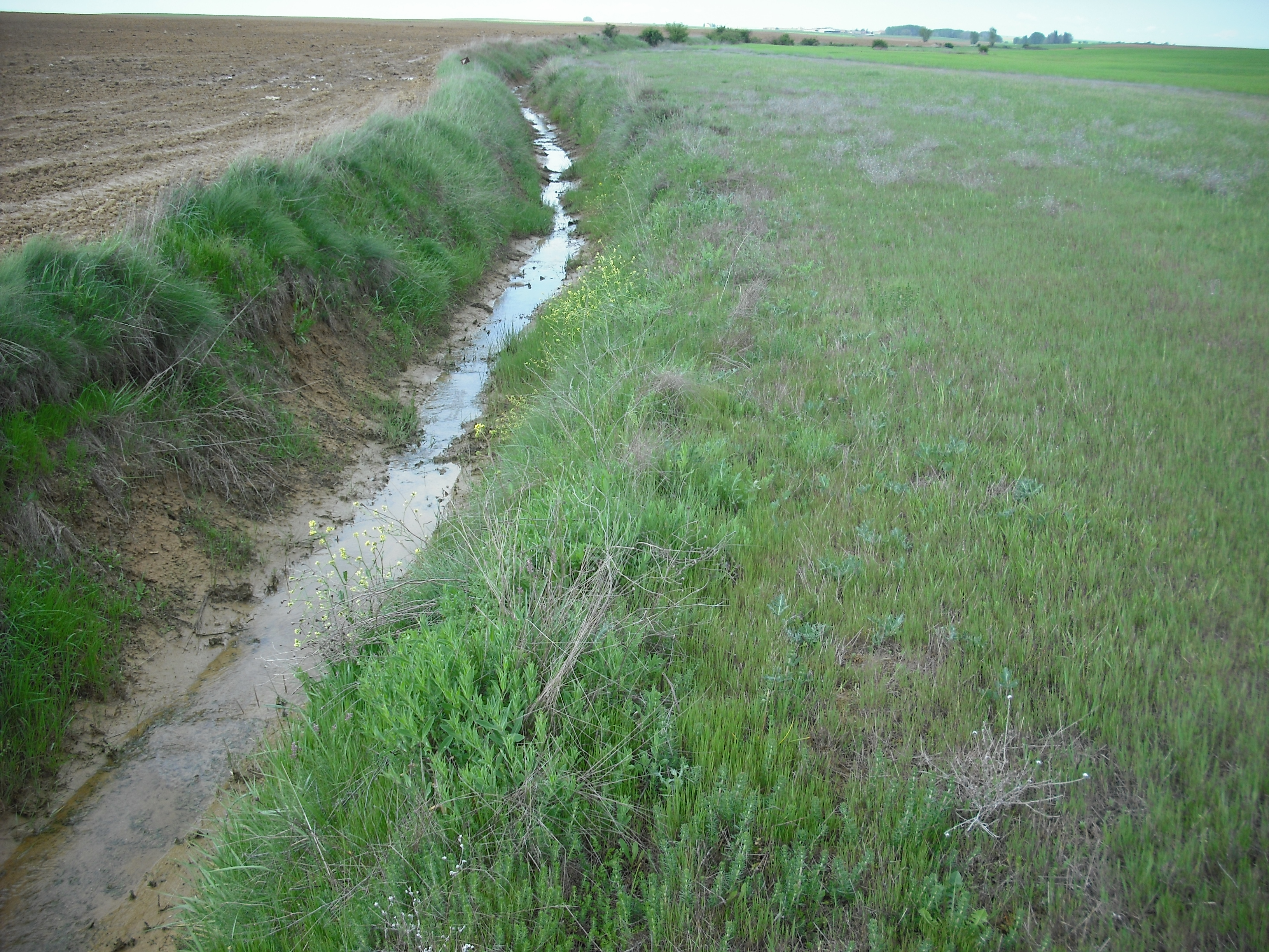 nacimiento del navajos